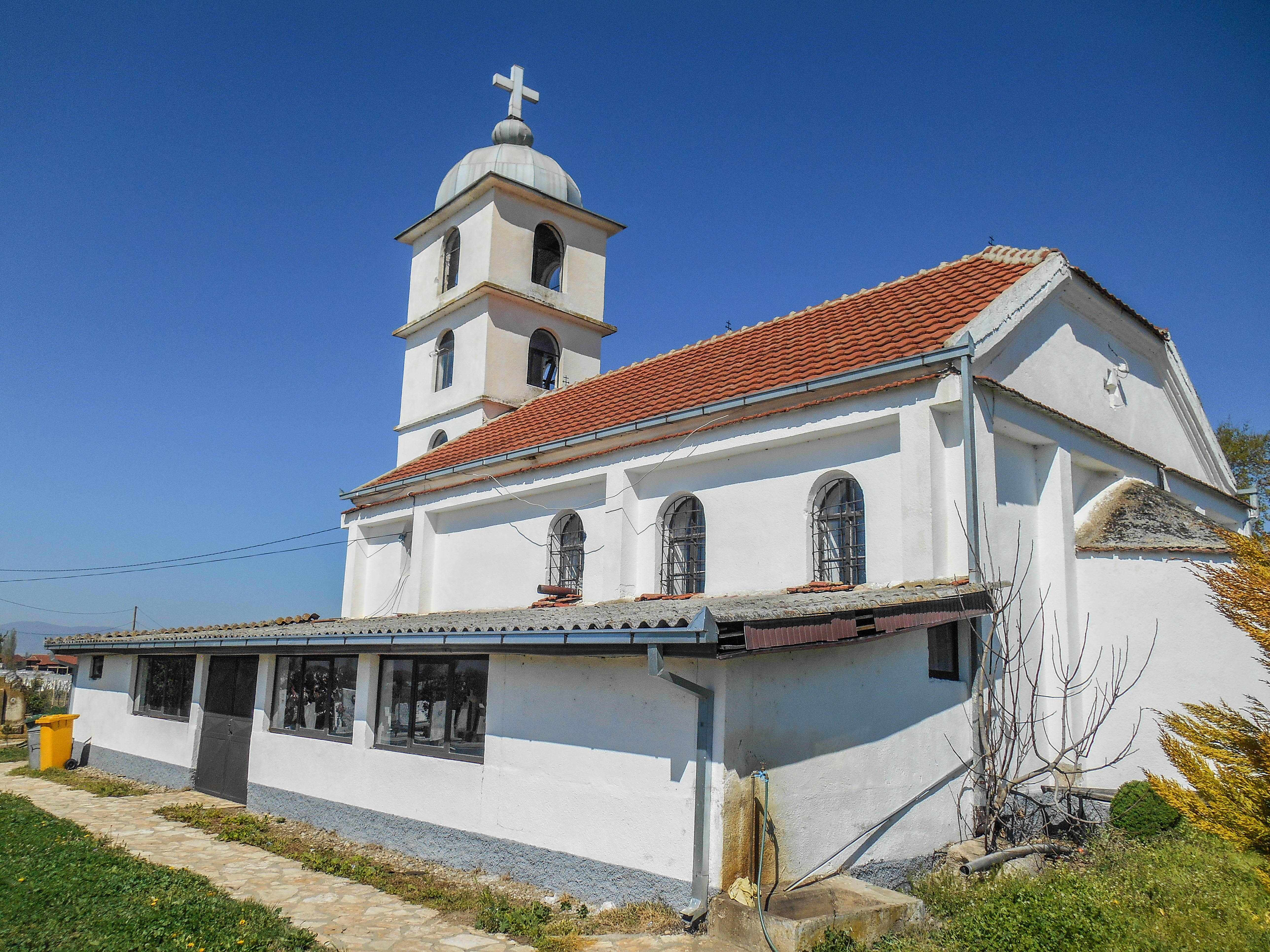 Црква „Св. Ѓорѓи“ - Петралинци